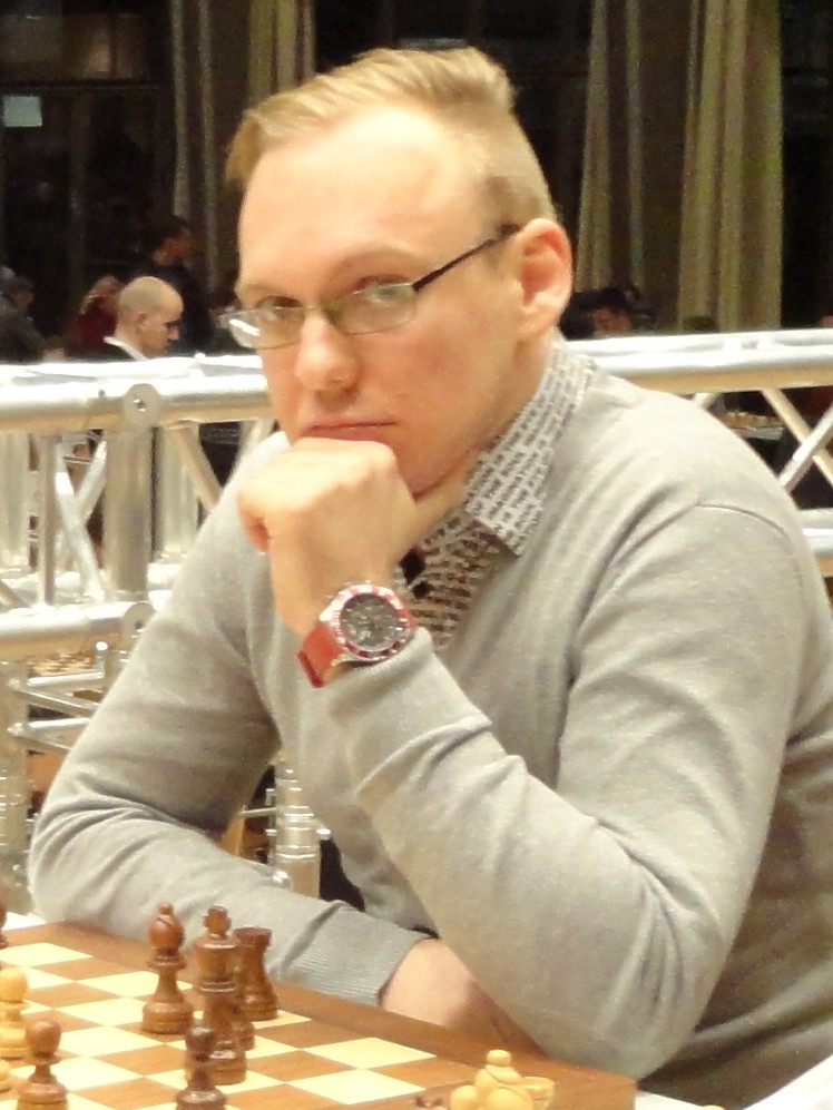 Markus Ragger, Grenke Chess Open 2016 in Karlsruhe.